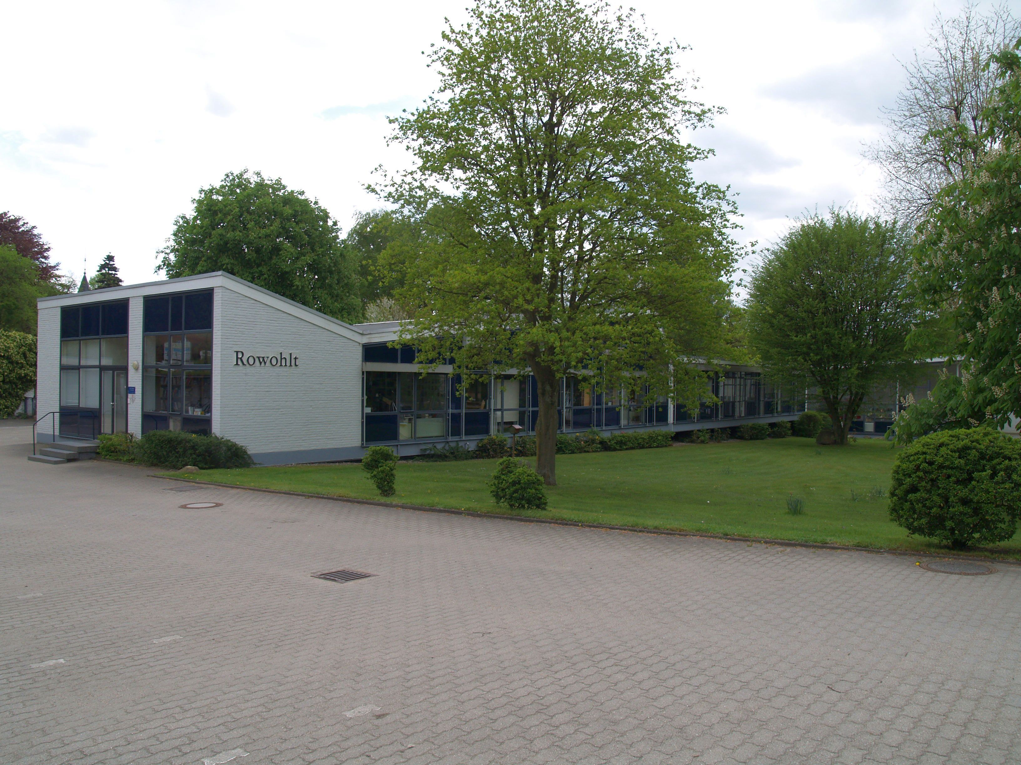 Rowohlt-Verlagsgebäude in Reinbek, Kreis Stormarn, Deutschland